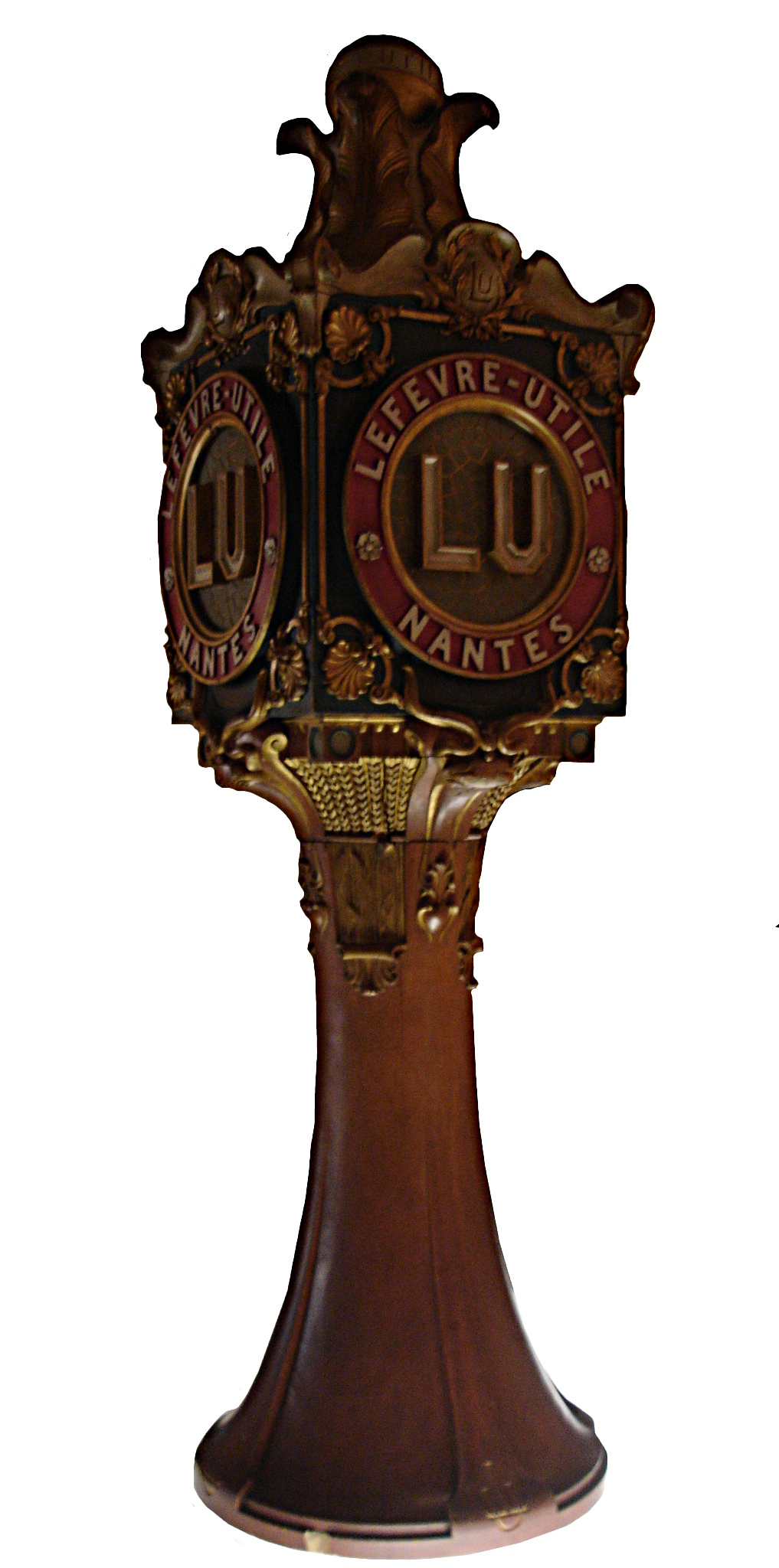 réplique du phare LU de l'exposition universelle de 1900 - photo prise au Musée du château des ducs de Bretagne de Nantes